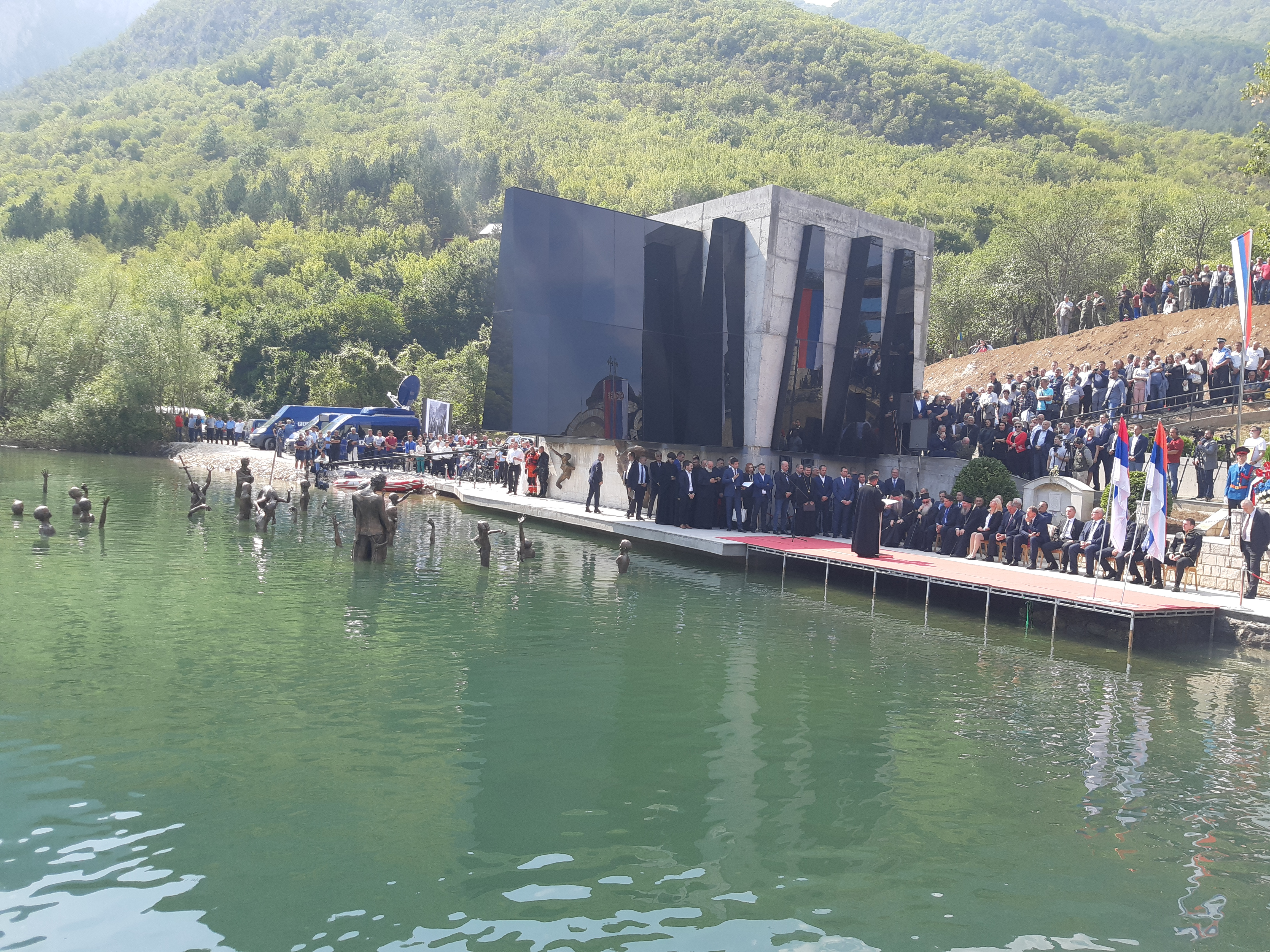 Stari Brod - Kao znak sećanja na srpske mučenike stradale u pokolju ustaša 1942. godine, 7. septembra 2019. godine u Starom Brodu osveštan je Spomen-muzej za koji je projekat uradio arhitekta Novica Motika iz Zvornika.